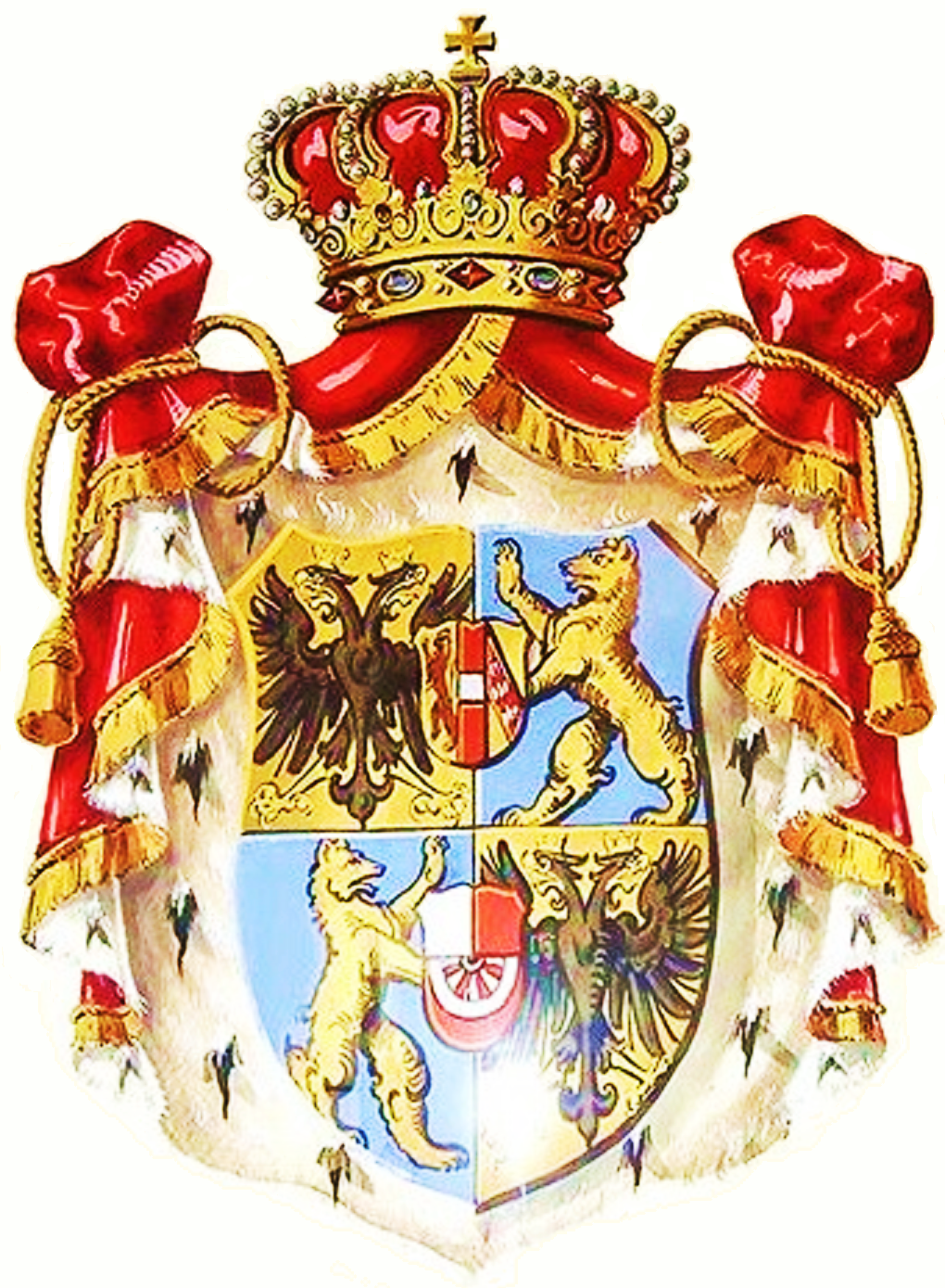 Persönliches Wappen der Gräfin Sophie Chotek de Chotkova et Vognin (Gräfin Chotek von Chotkova und Wognin) als Fürstin und Herzogin von Hohenberg